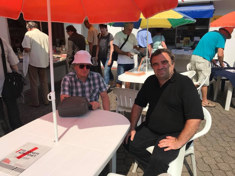 Kovács Sándor, Lengyel János. Könyvhét.